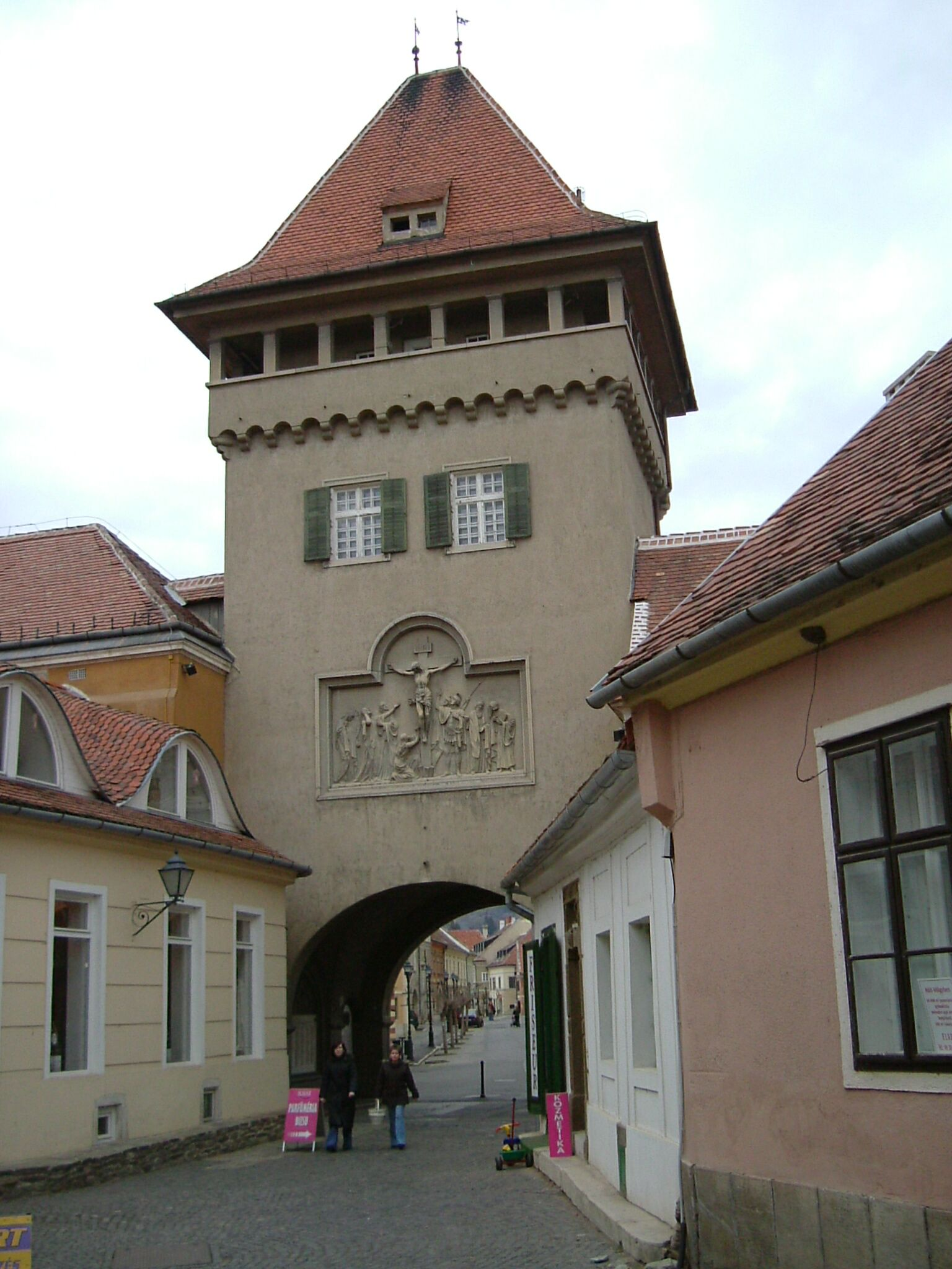 Kőszeg - Hungary, Heros' gate